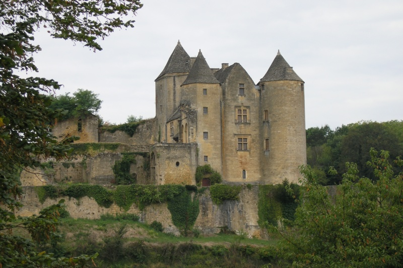 Le château fort des Salignac-Fènelon. Août 2005.